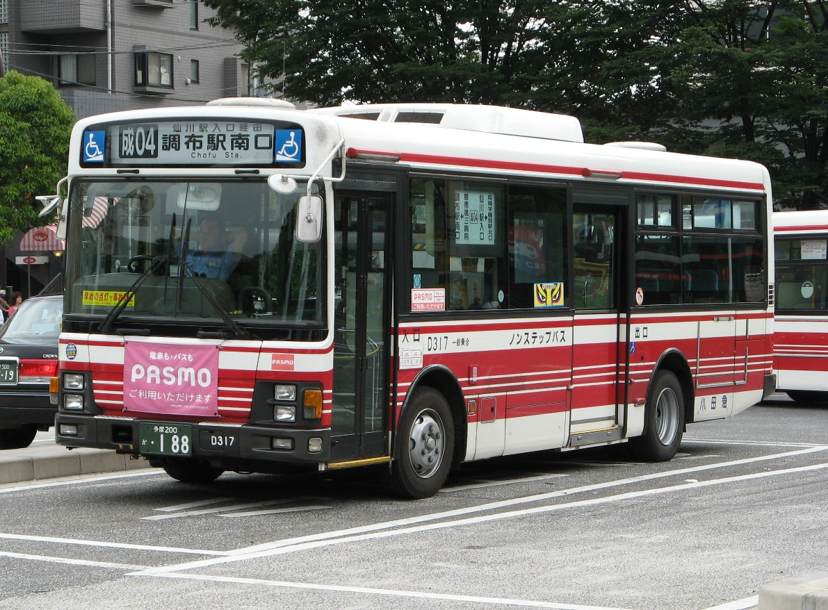 小田急バスD317号車。成城線には中型車が投入される。調布駅南口広場にて撮影。